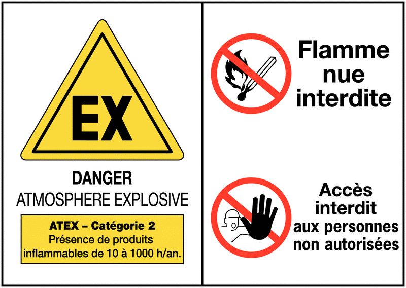 Panneau de signalisation présent dans les zone ATEX. Prévient du danger, de l'interdiction de flamme et de personnes non-autorisées